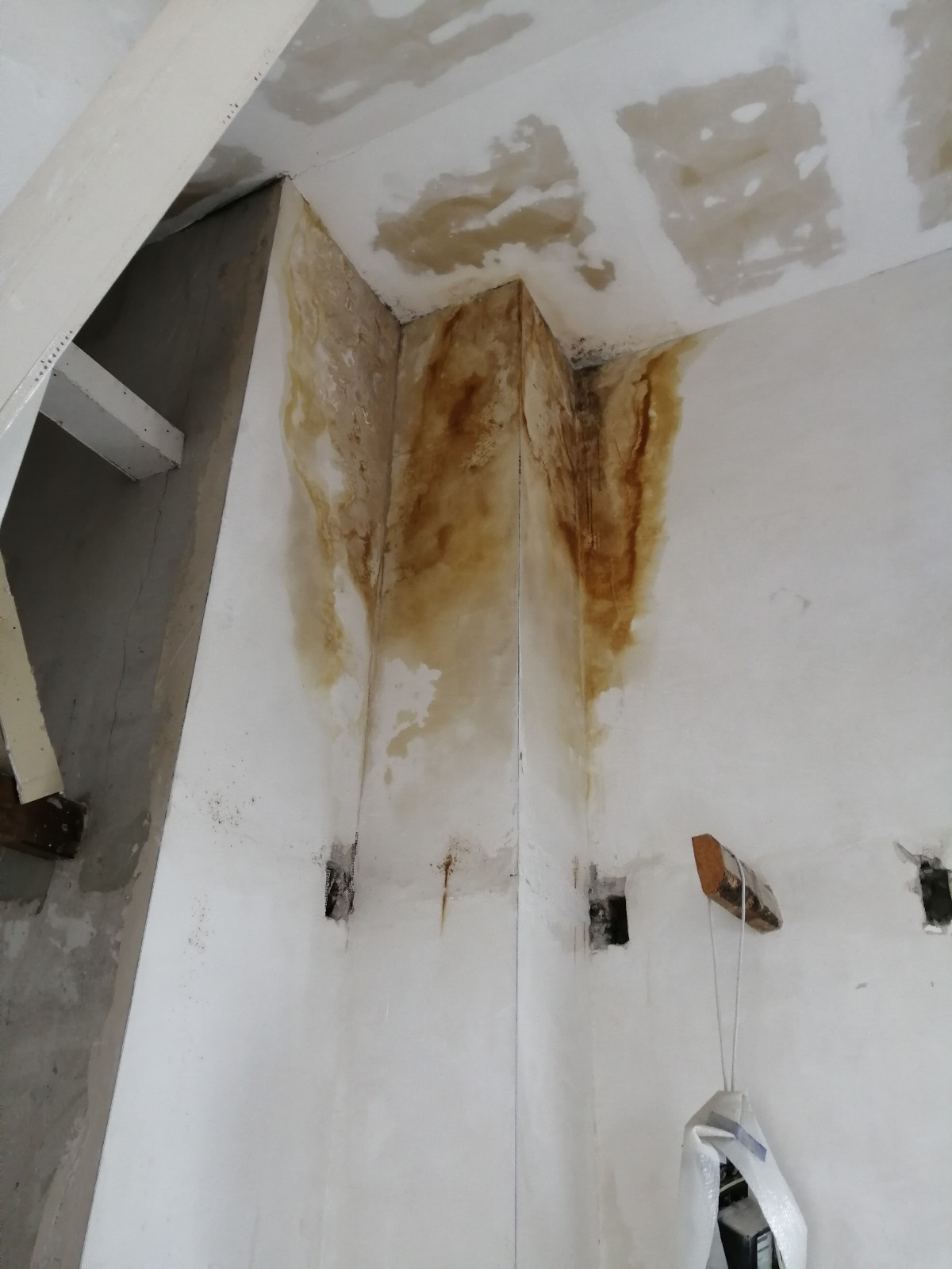 Bei dieser Kaminversottung ist es durch eine beschädigte Kaminabdeckung zu einem Wassereintritt gekommen.